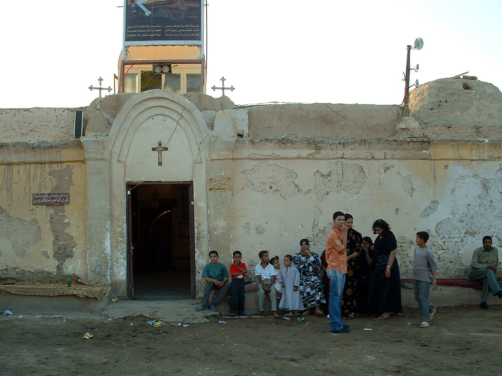 Monasterio Copto tras el Valle de los Reyes